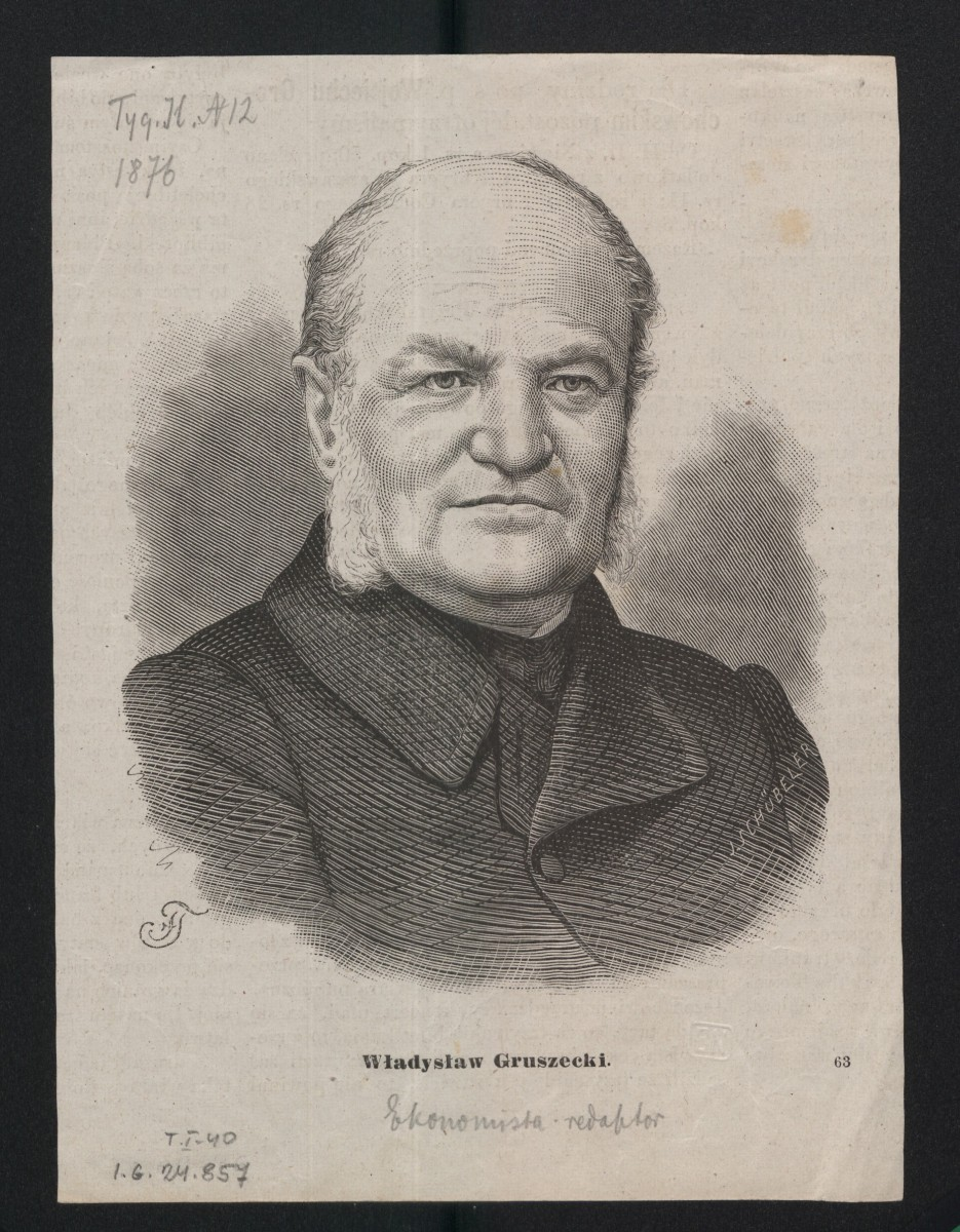 Władysław Gruszecki (1812-1876), członek Rady Stanu Królestwa Polskiego, członek Rady Głównej Opiekuńczej zakładów dobroczynnych, radca Towarzystwa Kredytowego Ziemskiego